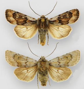 Euxoa muldersi male (top) female (bottom)